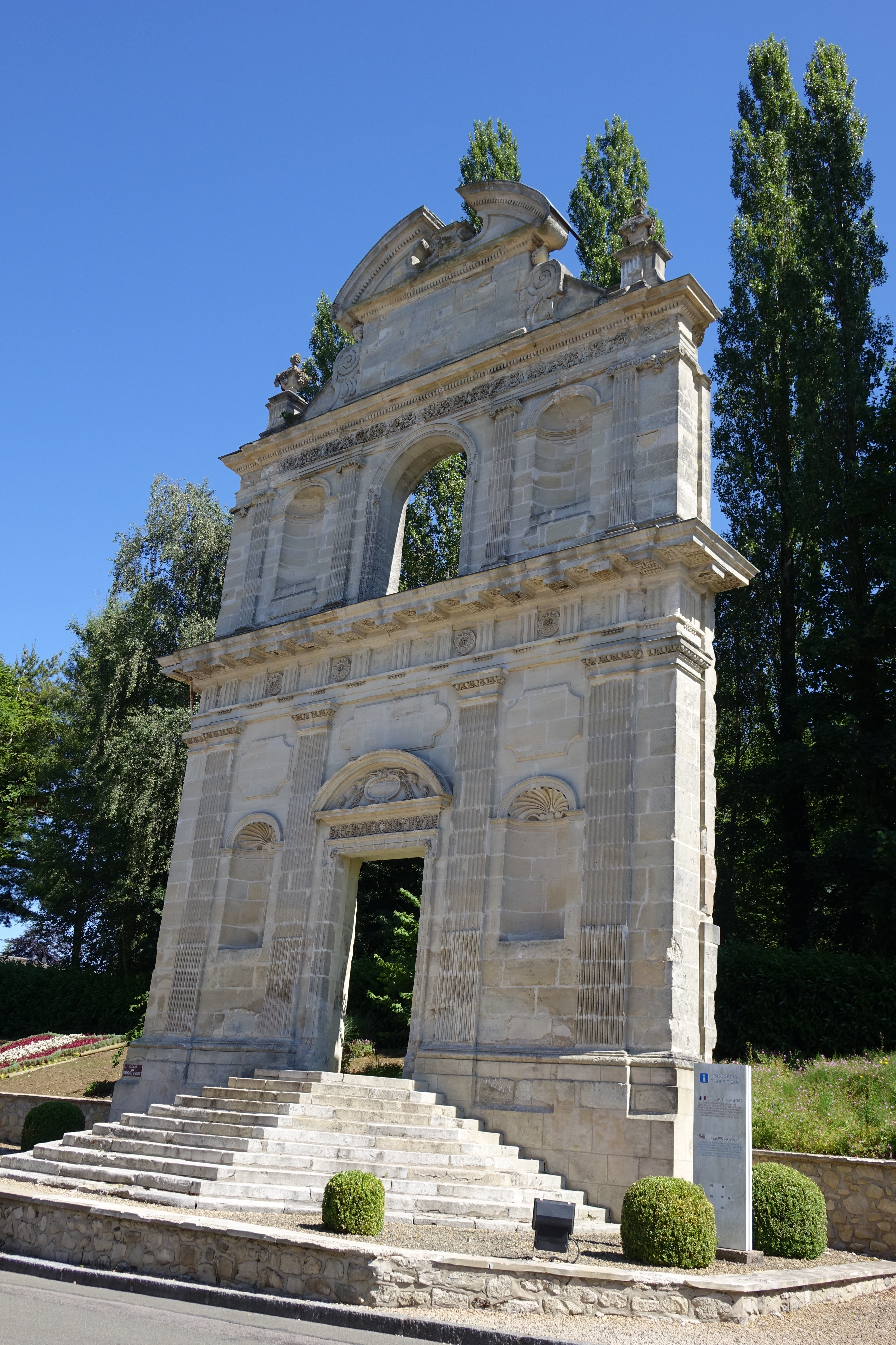 La Porte de Gisors à Forges-les-Eaux, Seine-Maritime, France